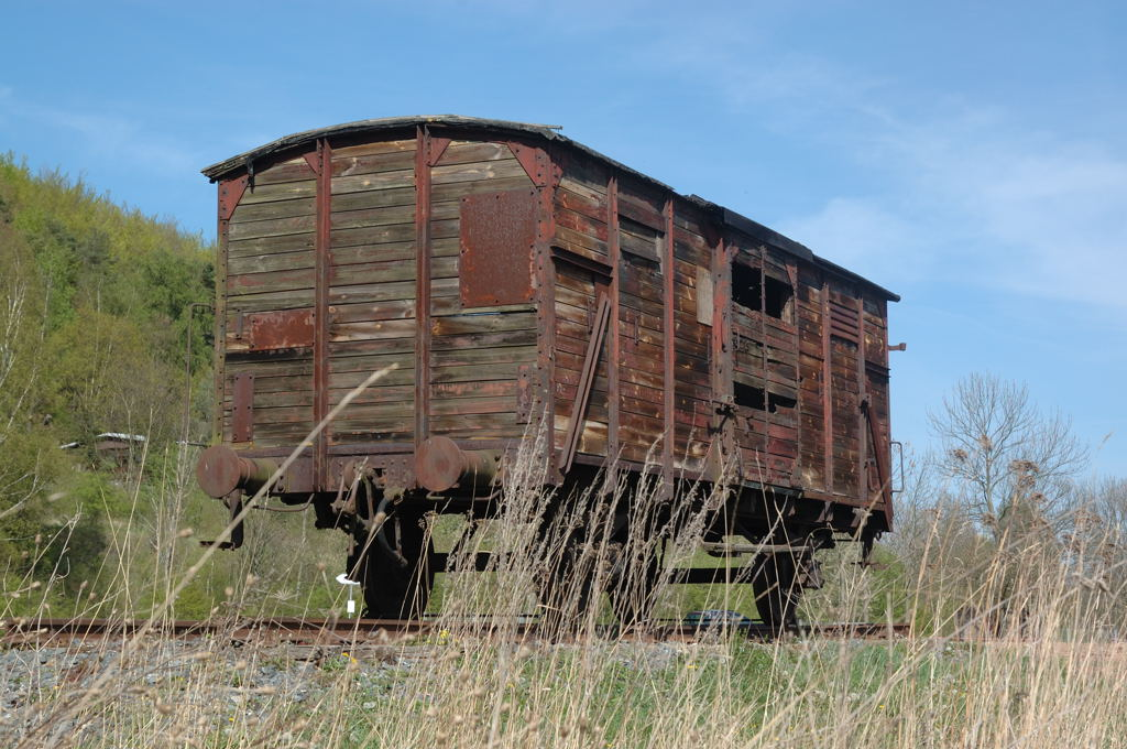 Gedenkstätte Mittelbau-Dora, einer der Waggons, in denen Häftlinge transportiert wurden